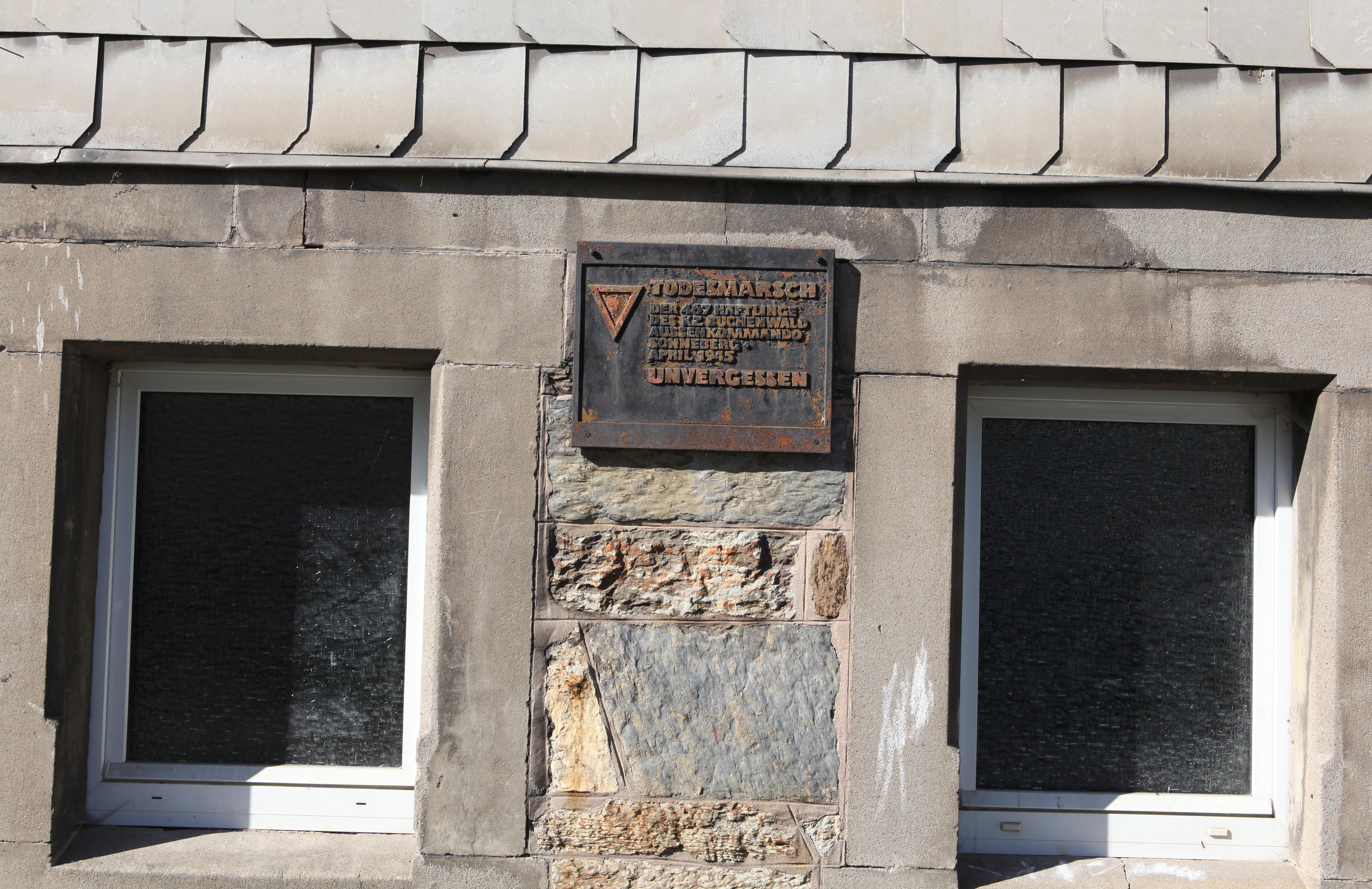 Gedenktafel Steinacher Straße 4 in Hasenthal, OT von Oberland am Rennsteig, Landkreis Sonneberg